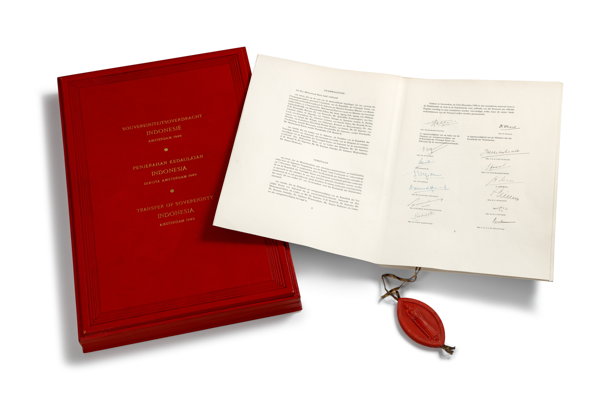 Soevereiniteitsoverdracht aan Indonesië, KdK, 1946-1975, inventarisnummer 13684